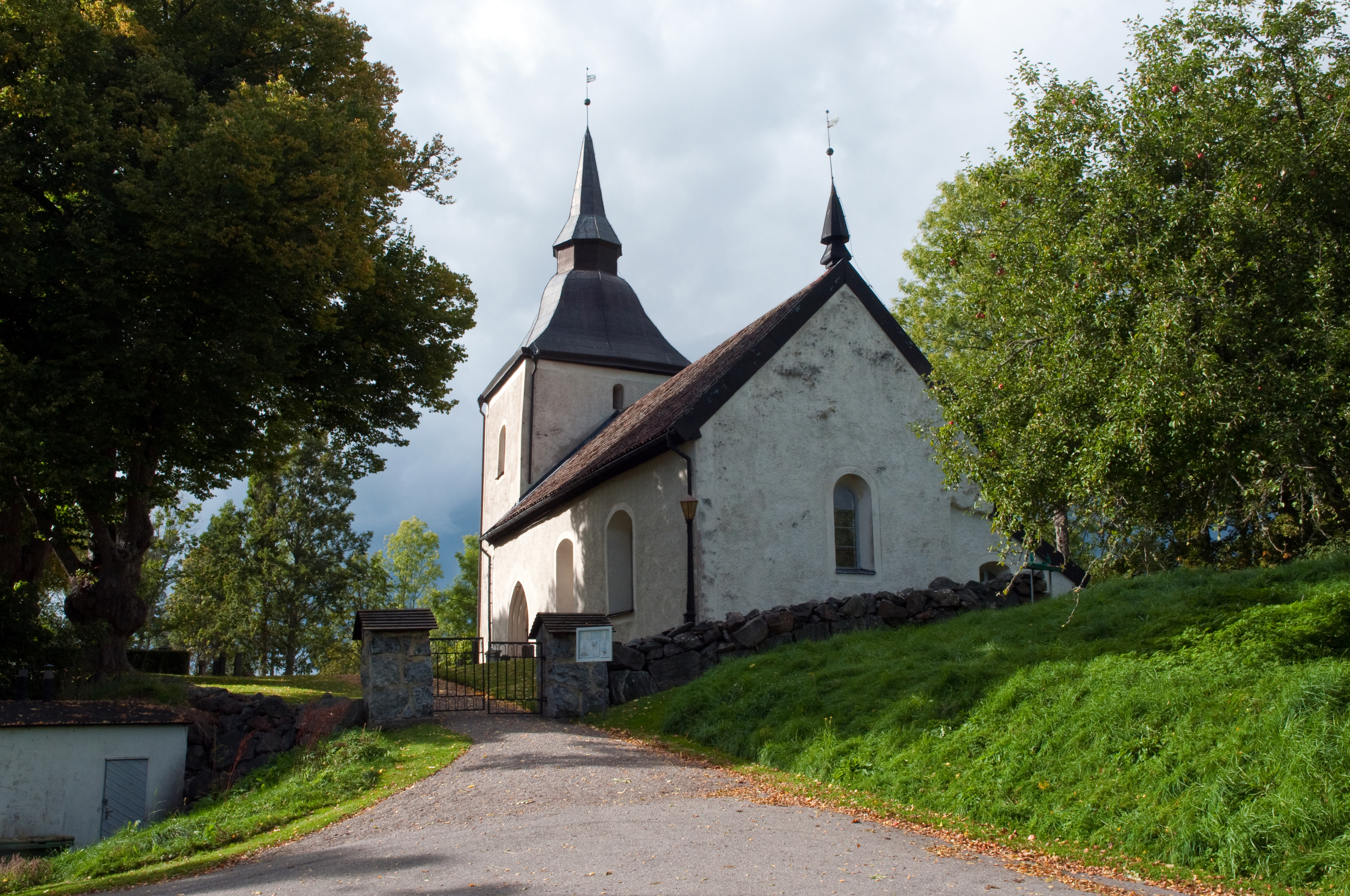 Bogsta kyrka i Nyköpings kommun